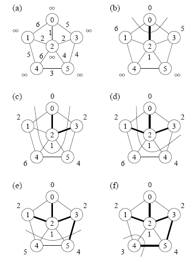 Algoritmo de Prim. Exemplo de utilização do algoritmo de Prim para encontrar uma Árvore Geradora Mínima de um grafo